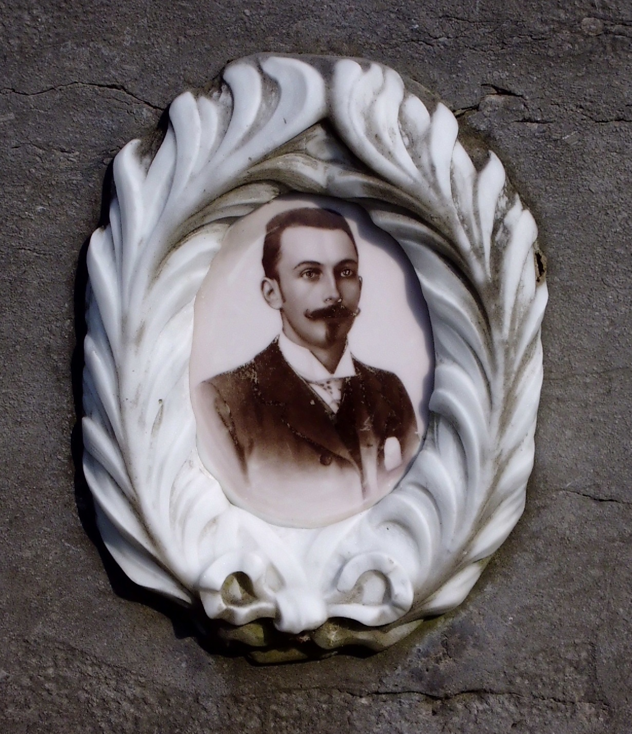 Grafmonument van de familie Charels - De Cock op het kerkhof (kerk) van Ver-Assebroek (vak B21). Foto van Louis Ernest Charels.